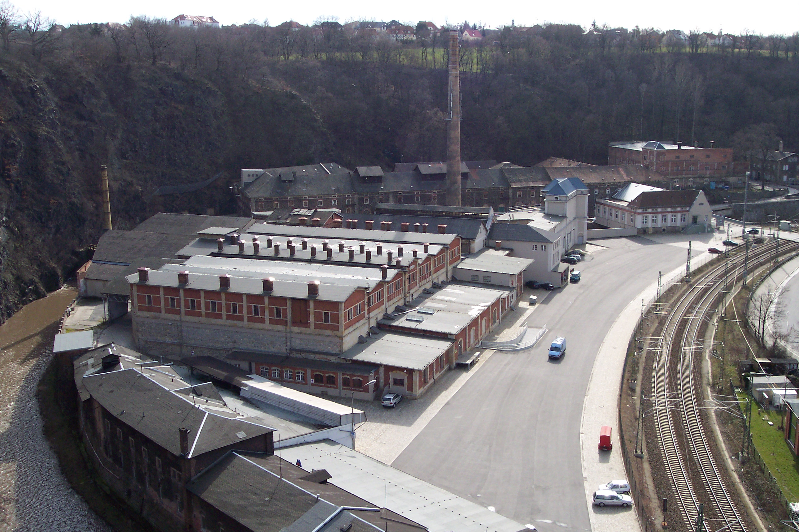 Die ehemalige Felsenkeller-Brauerei in Dresden vom „Hohen Stein“ aus gesehen.